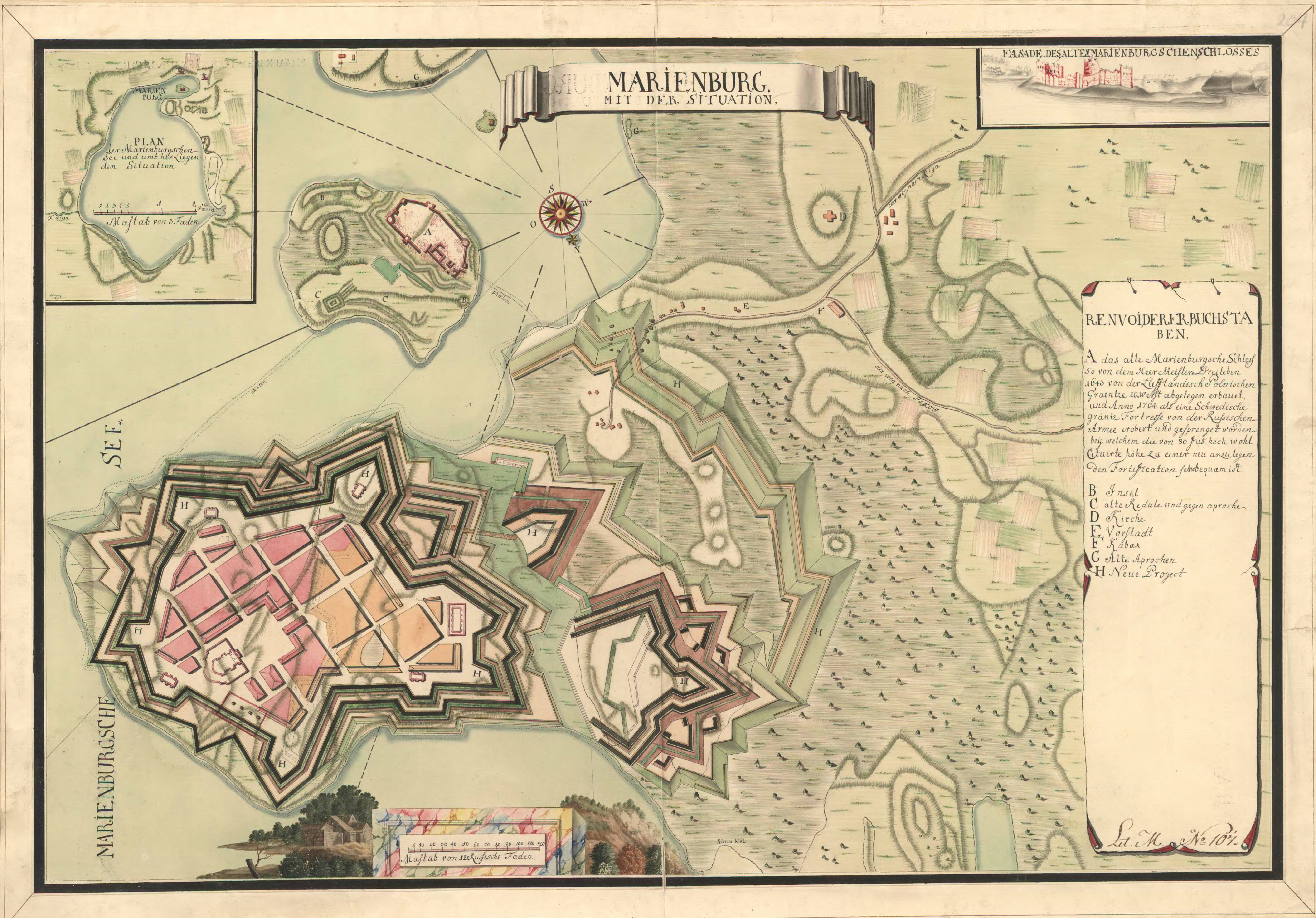 Rootslase Eric Dahlbergi koostatud Aluliina kindluse rajamise plaan.